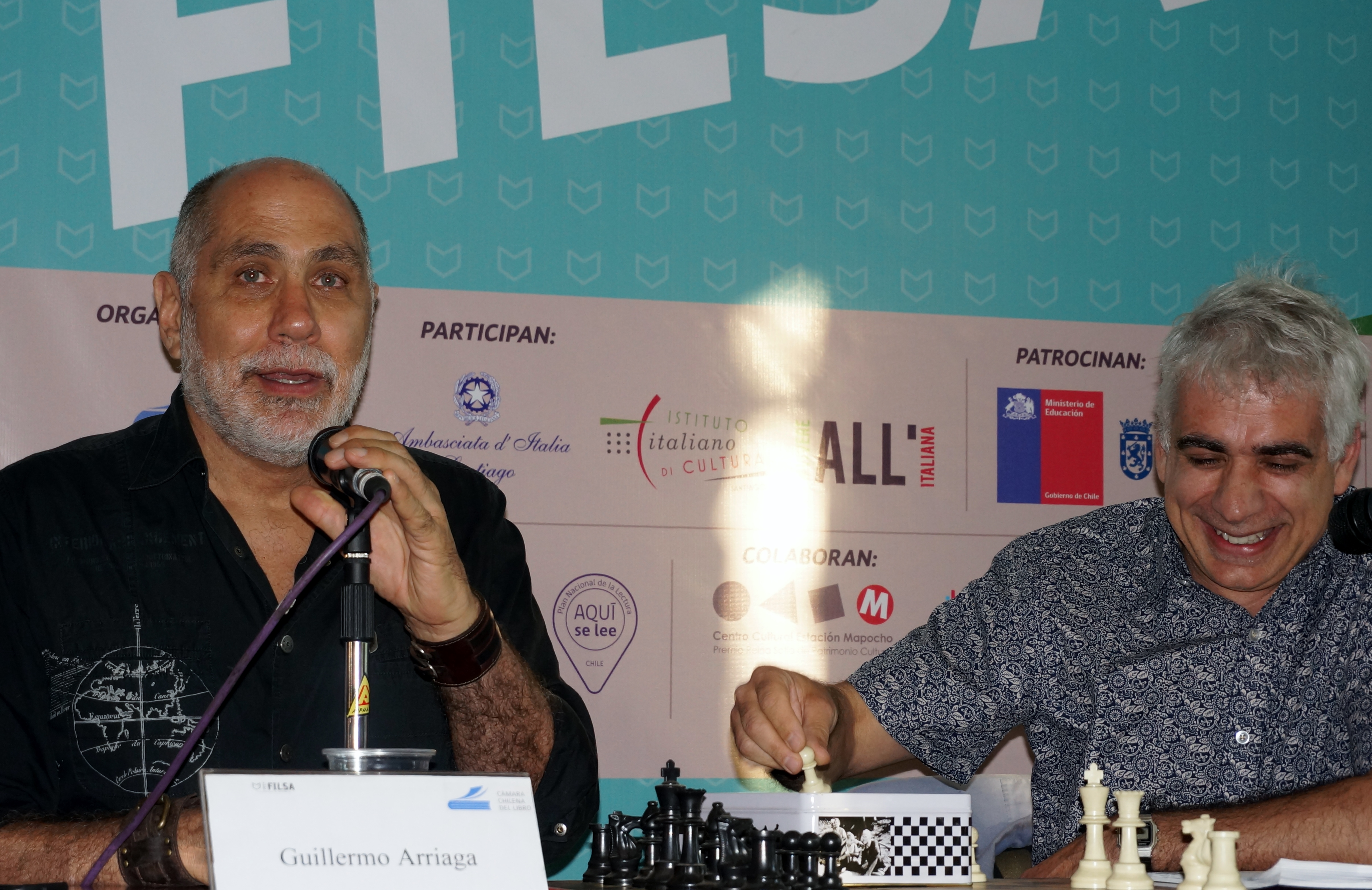 Los cineastas y escritores mexicano, Guillermo Arriaga, y chileno, Boris Quercia, durante la presentación de la novela del primero, El salvaje, en la Feria Internacional del Libro de Santiago 2017.